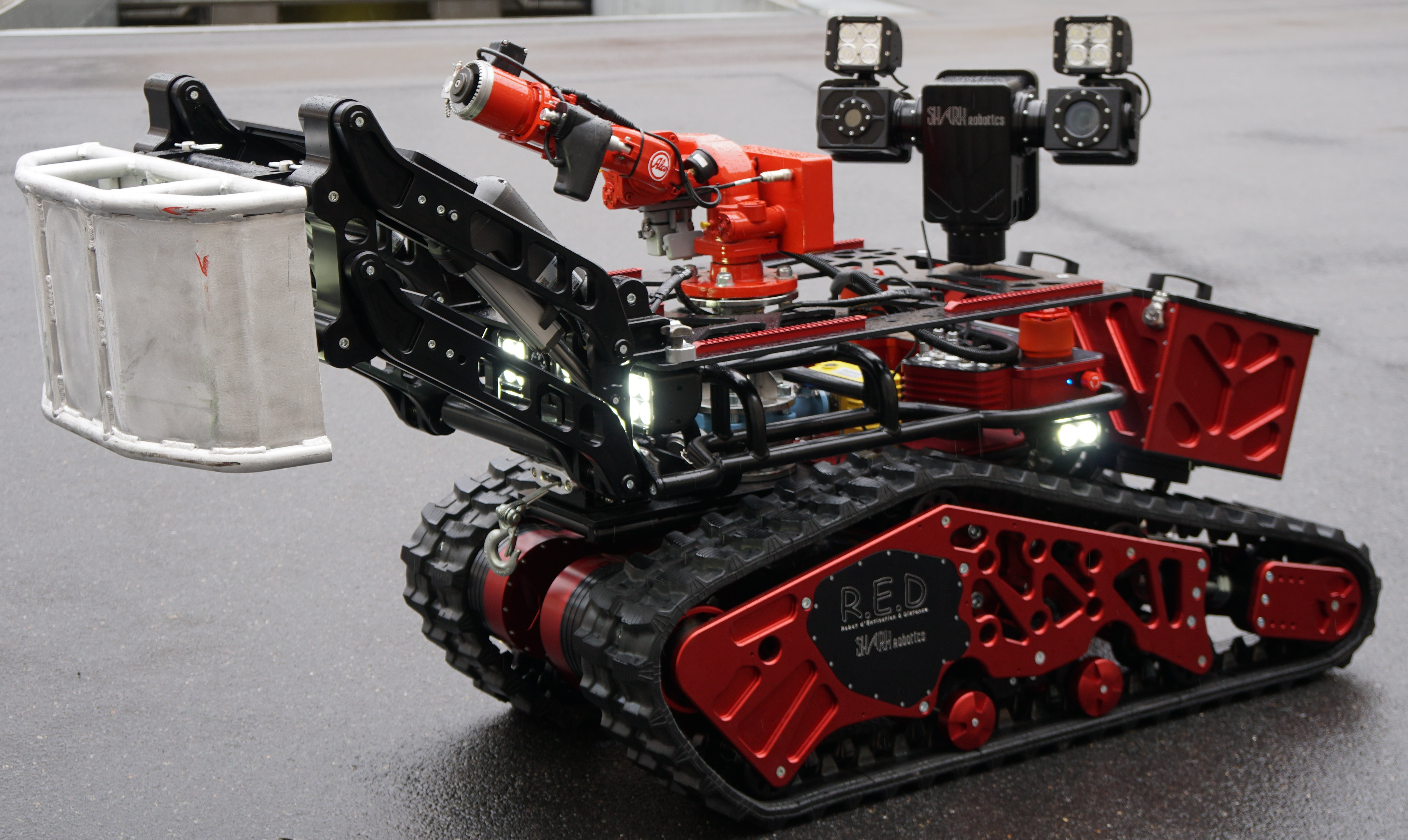 Robot Colossus de la société Shark Robotics - Robot pompier